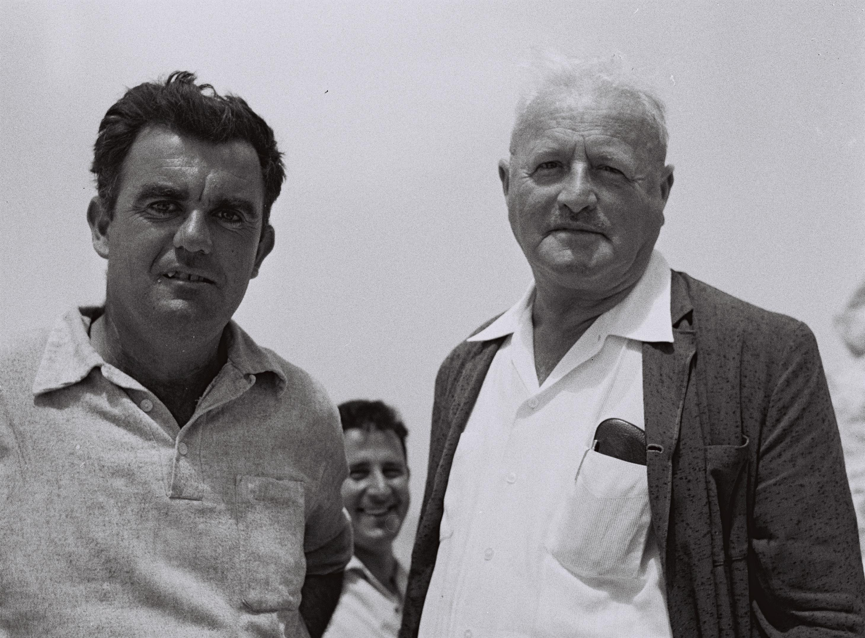 יהושע כהן (משמאל), ממיסדי שדה בוקר, עם דוד טוביהו ראש עיריית באר שבע